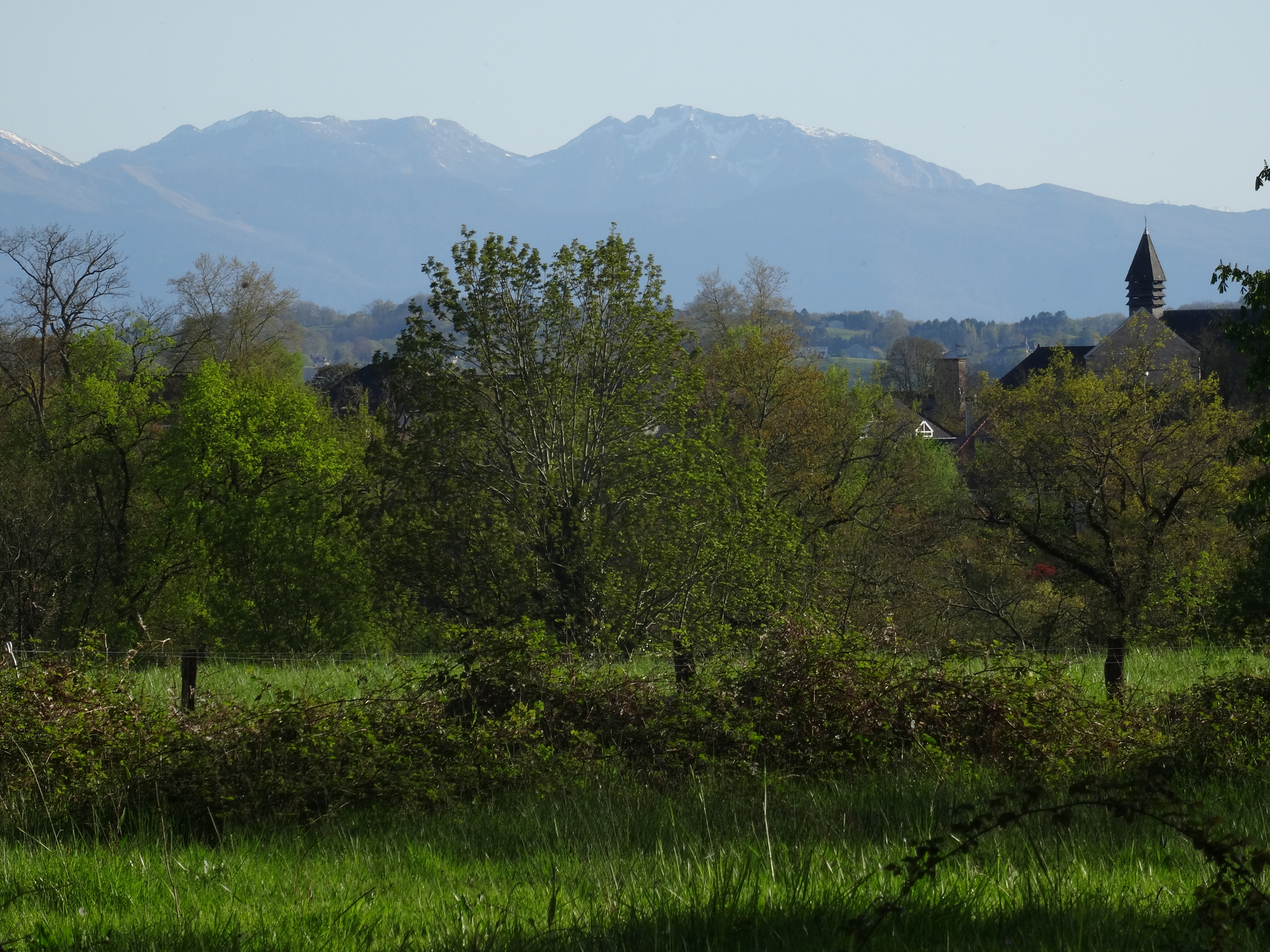 Vue sur Lescar, avec la cathédrale et les Pyrénées